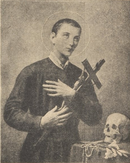 Gérard Majella